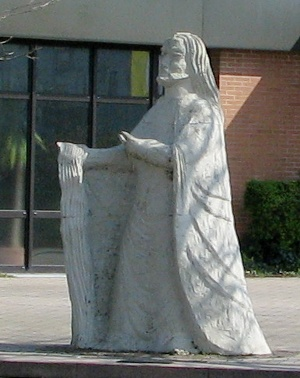 St-Johannes-Kirche in Mannheim-Rheinau-Süd, Skulpur von Leo Janischowsky 1984